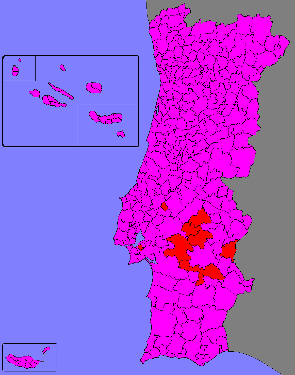 Mapa ilustrativo do candidato mais votado por concelho